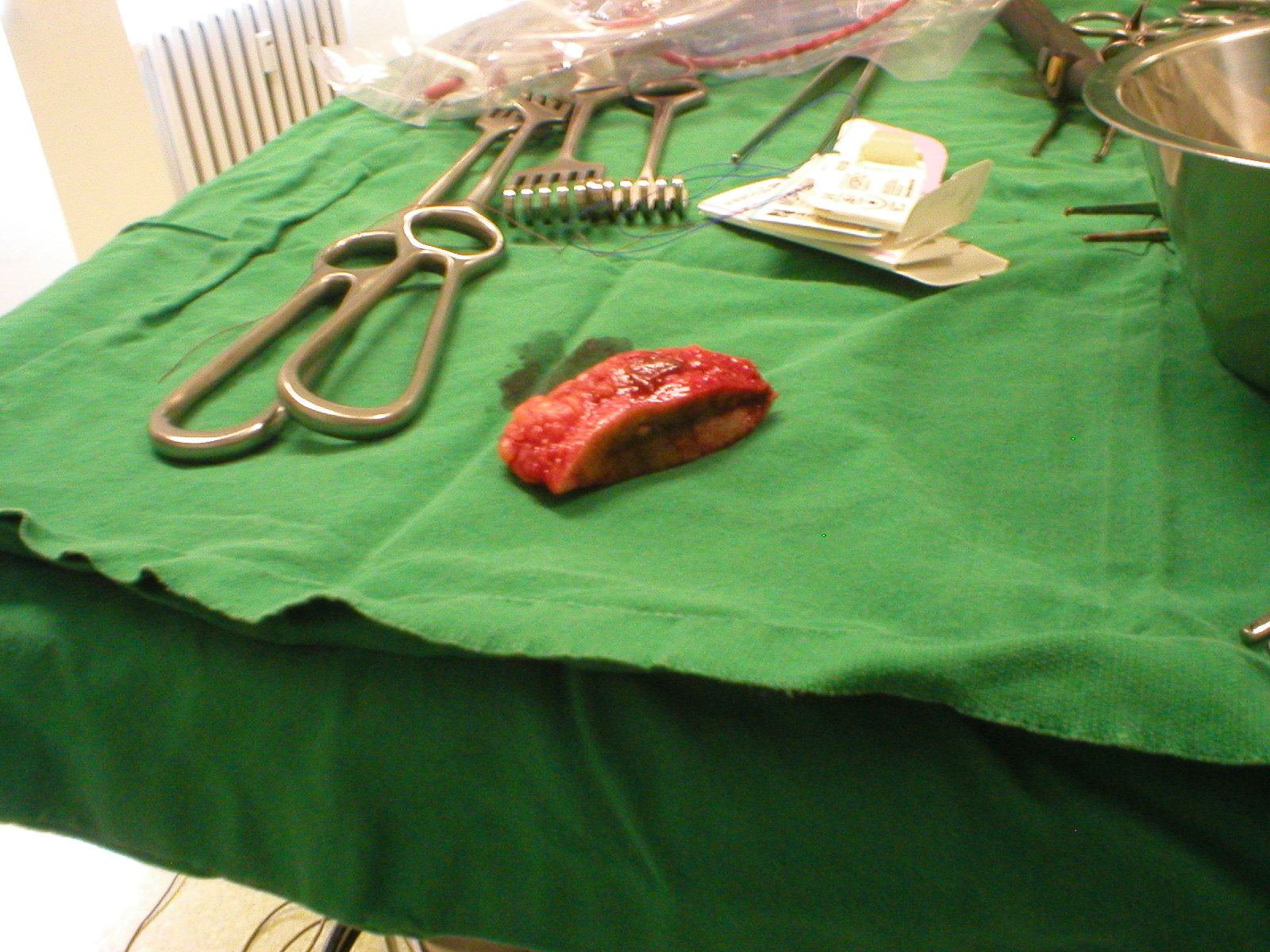 extrahierte Pinomidalzyste.